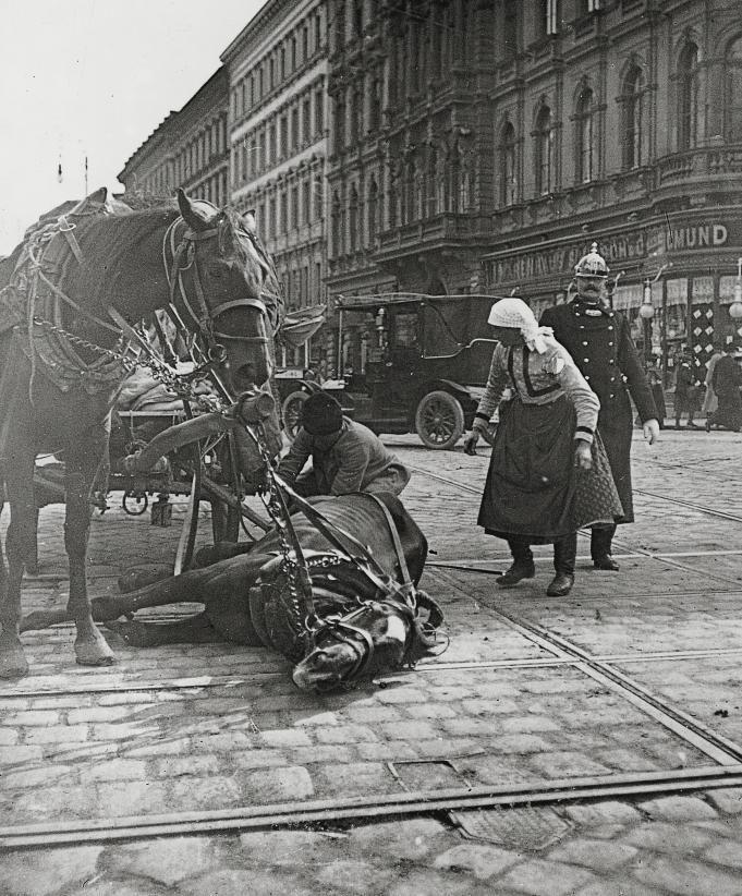 Unfall eines Pferdefuhrwerks aus der Slowakei, an der „Lastenstraße“ (Getreidemarkt, Ecke Mariahilfer Straße, Wien)